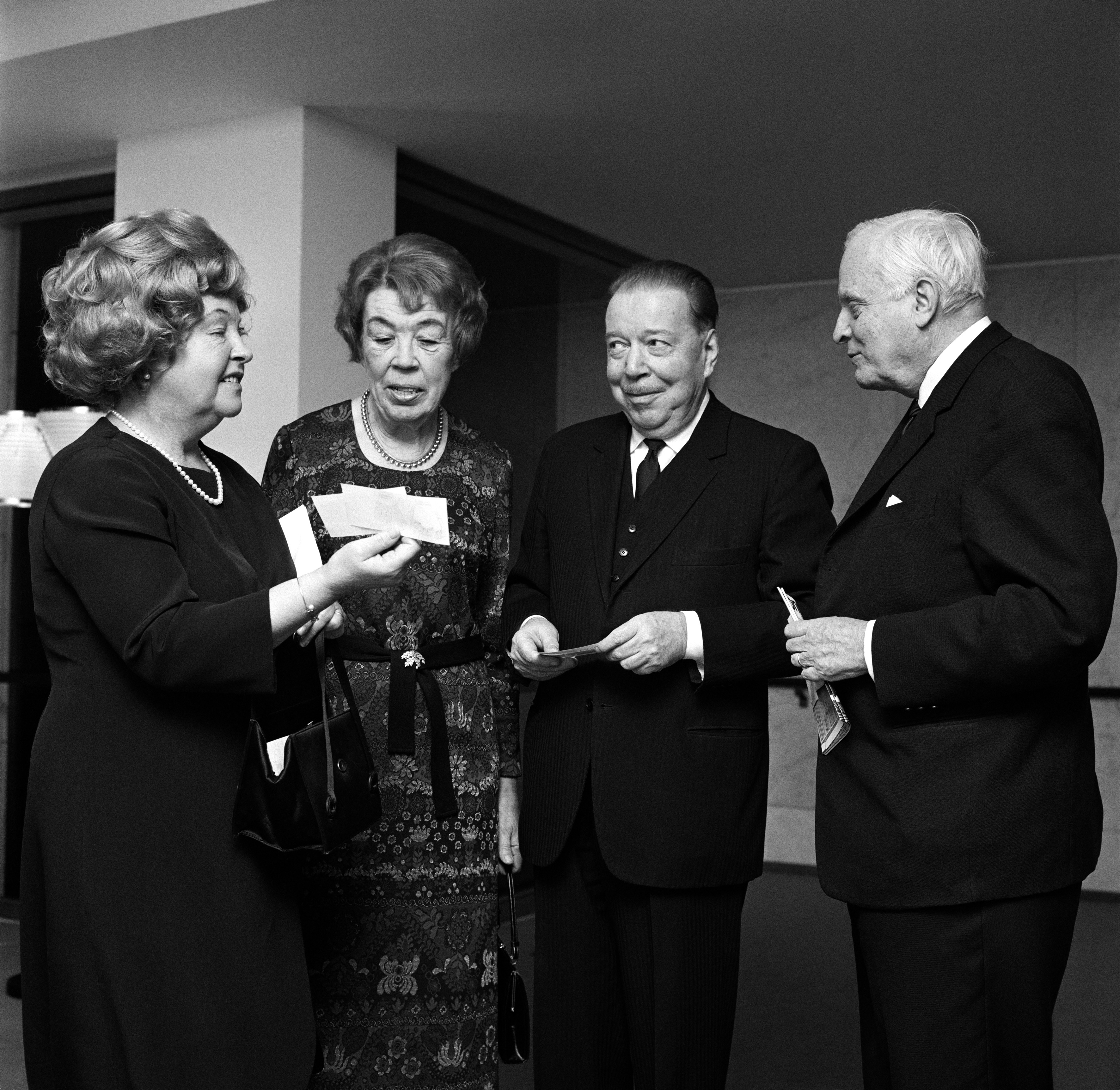 Finlandia-talon avajaiskonsertti, juhlayleisöä, mm. Mika ja Marjatta Waltari, Rolf ja Sinikka Nevanlinna.